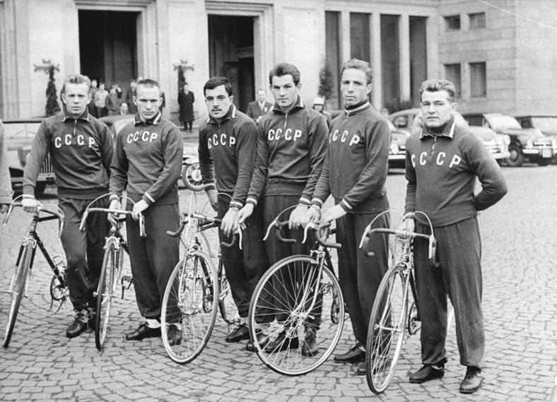 Friedensfahrt, Mannschaft der UdSSR Zentralbild Wendorf 2.5.1960 - Die Teilnehmer der Sowjetunion an der XIII. Friedensfahrt 1960. vlnr: Wjarawas, Jutschkow, Saldchushin, Olisarenko, Wostriakow, Kurbatow.